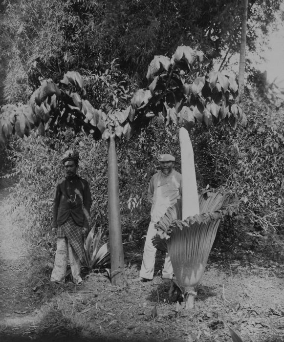 foto. Indonesische mannen poseren bij twee verschillende soorten Amorphophallus planten, waaronder een in bloei staande Amorphophallus Titanum